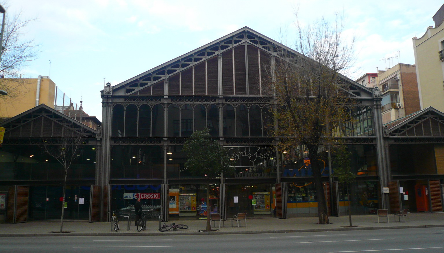 Mercat de la Concepció (Barcelona)